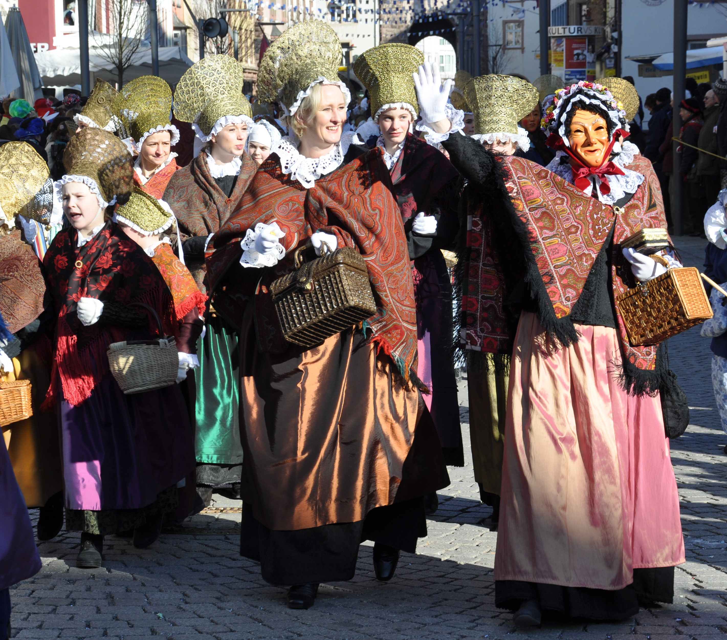 Historischer Umzug der Narrozunft Villingen, Fasnetsmontag 2011 Alt-Villingerinnen und Morbele (ganz rechts)